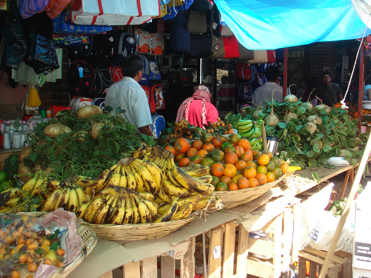 Mercado en Oaxaca